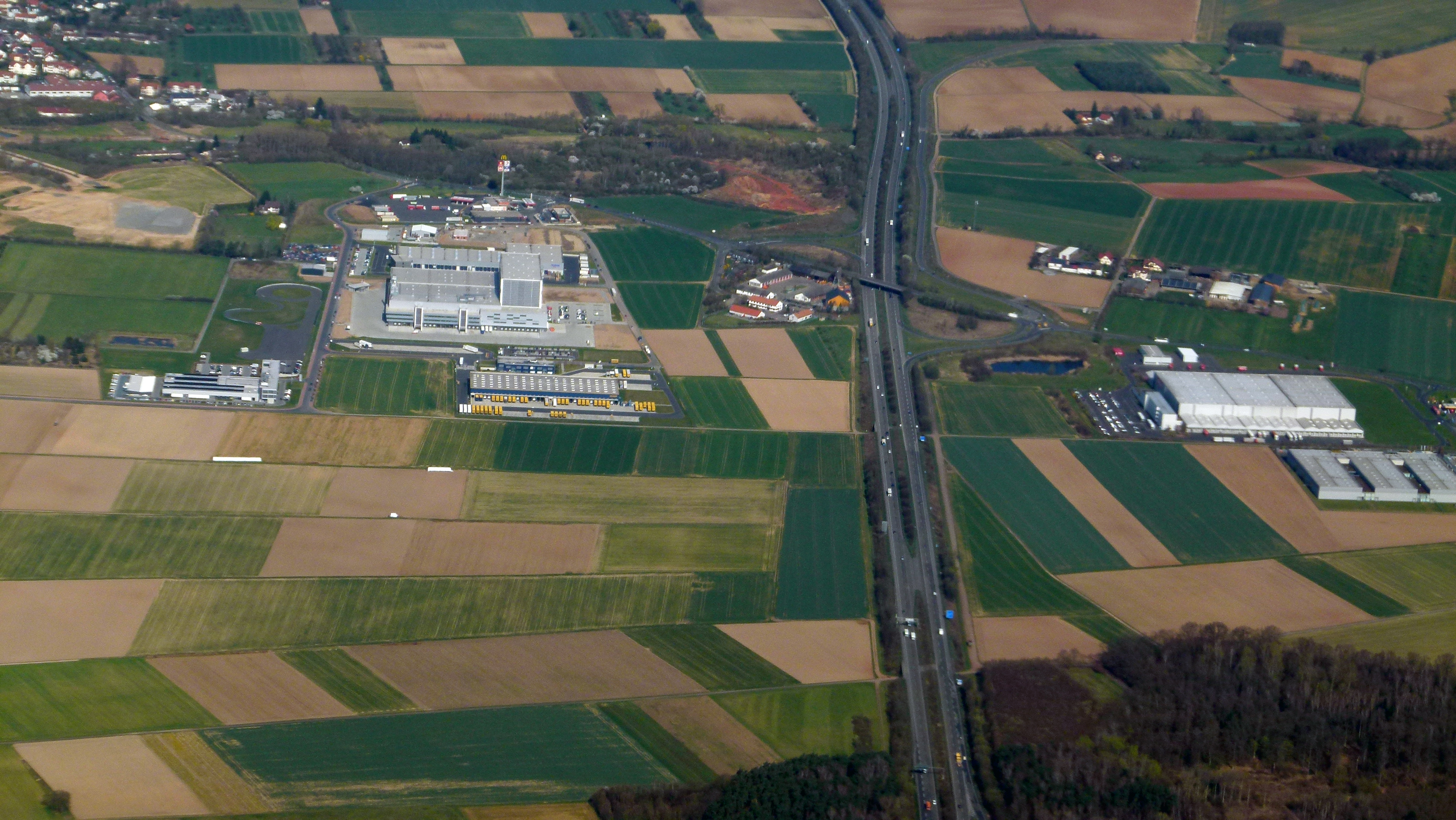 Luftbild von Langenselbold, Raststätte und Gewerbepark